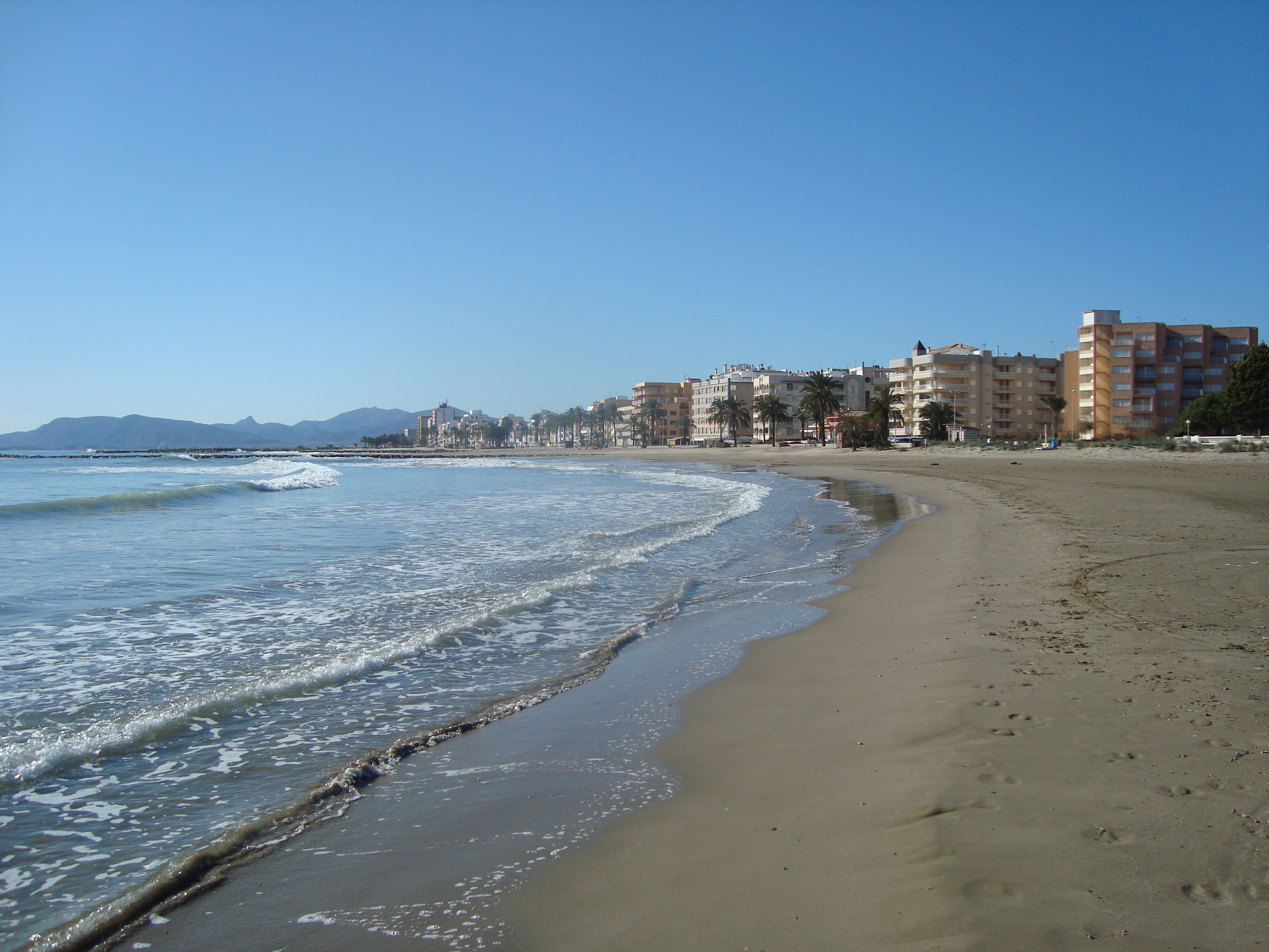 Platja de Torrenostra (Torreblanca) This is a a photo of a beach in the Land of Valencia, Spain, with id: PL-1471